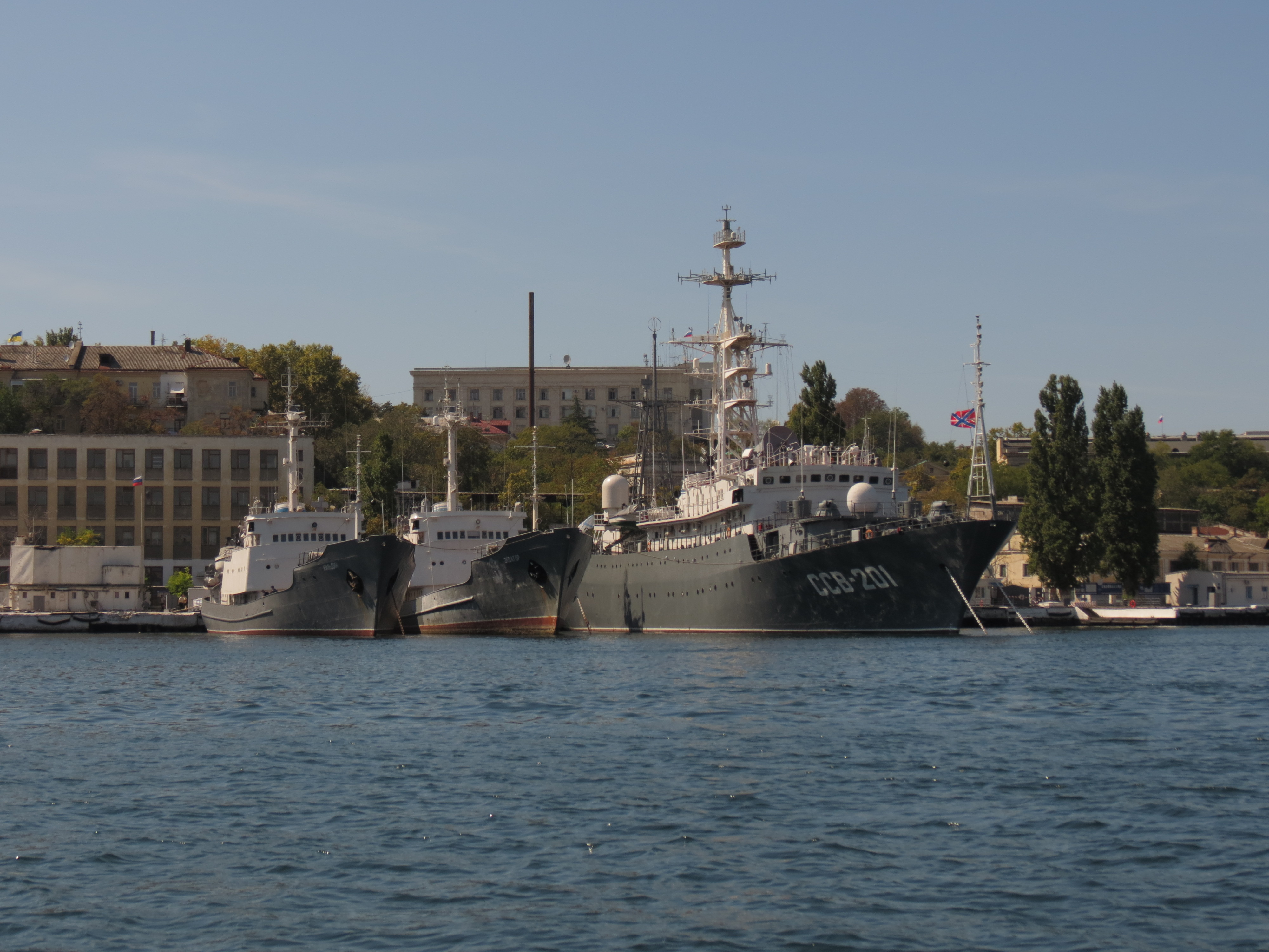 Севастополь